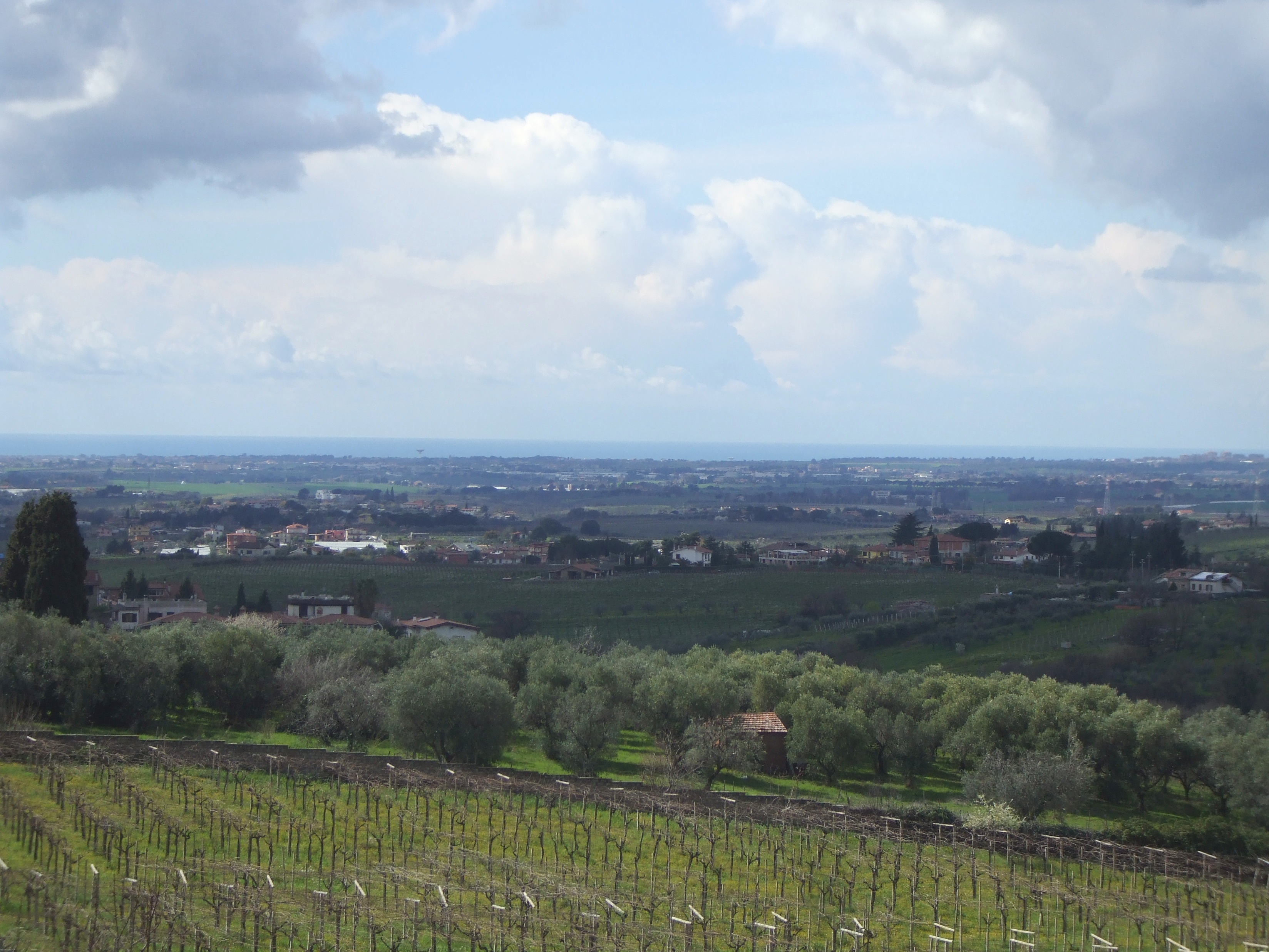 Cecchina panorama campagna e mare